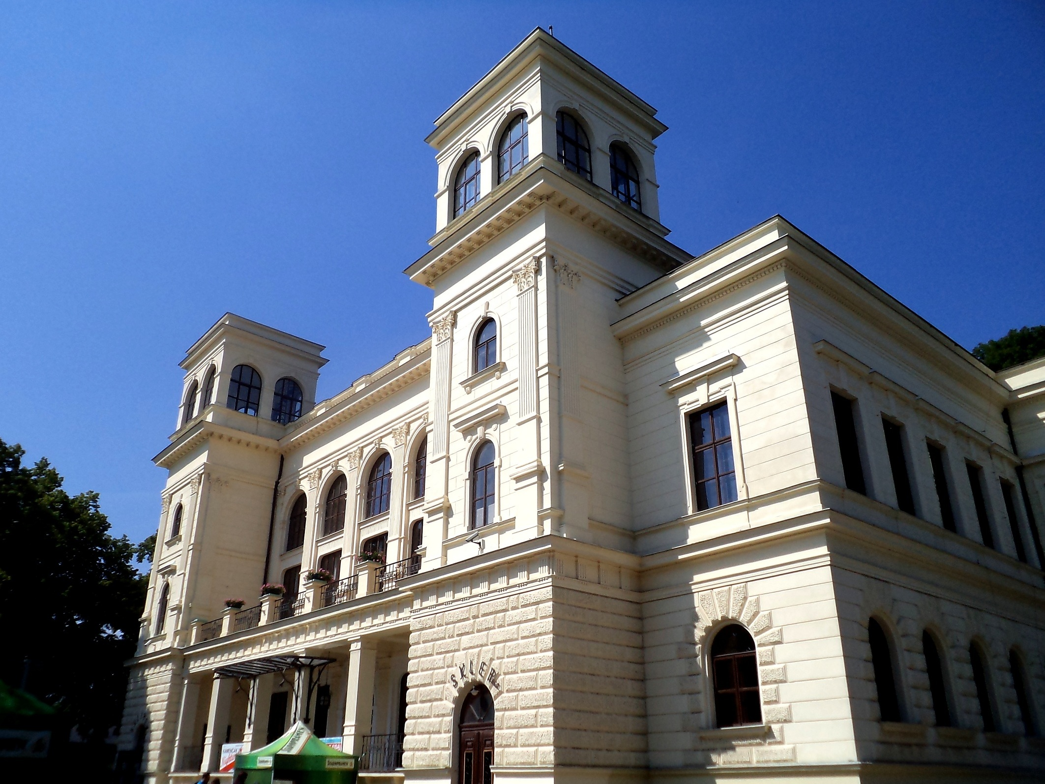 Chomutov - Městské divadlo